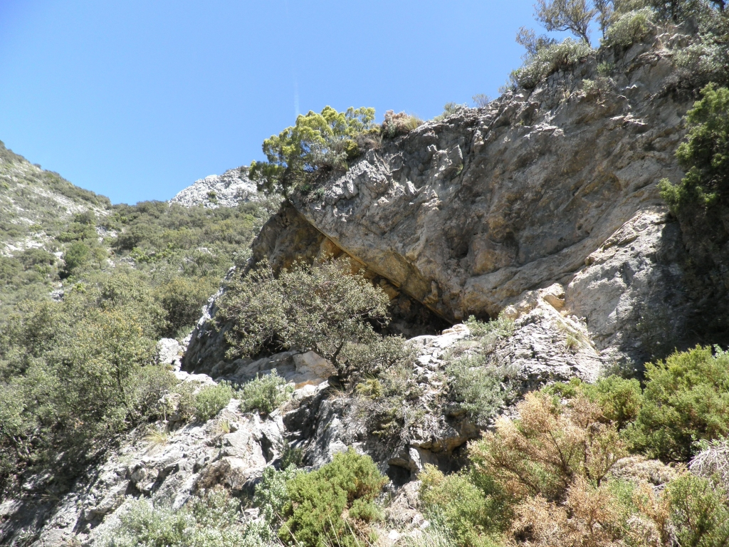 Sierra de Almijara